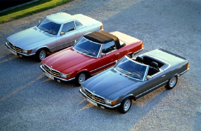 Mercedes SL x3